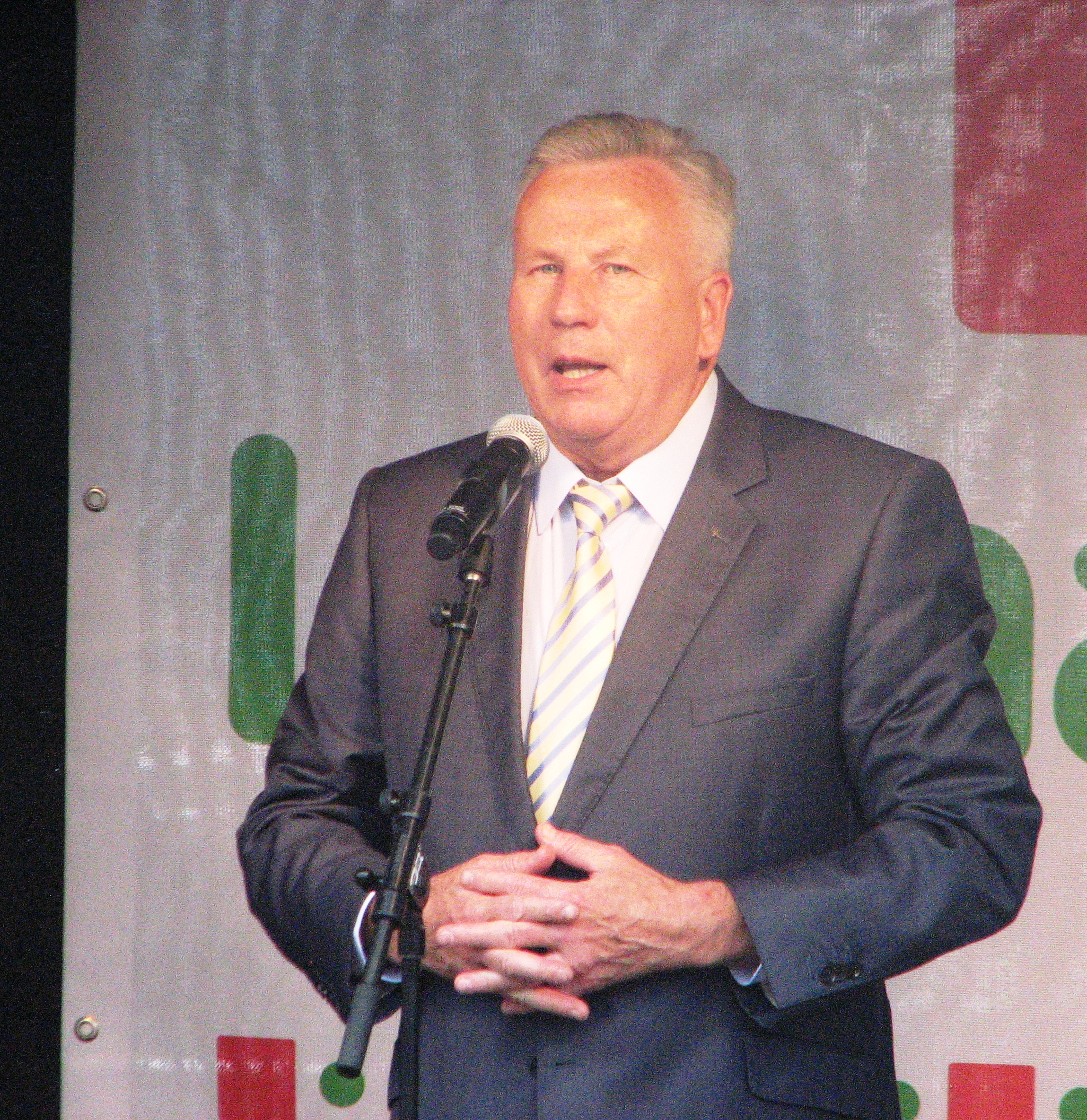 Arvo Sarapuu esinemas Lasnamäel Linnapoe avamisel